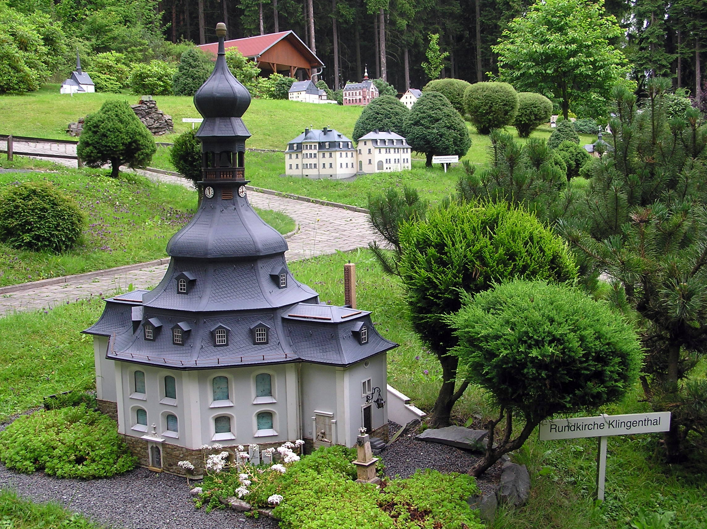 Miniatur-Schauanlage Klein-Vogtland in Adorf, Rundkirche Klingenthal